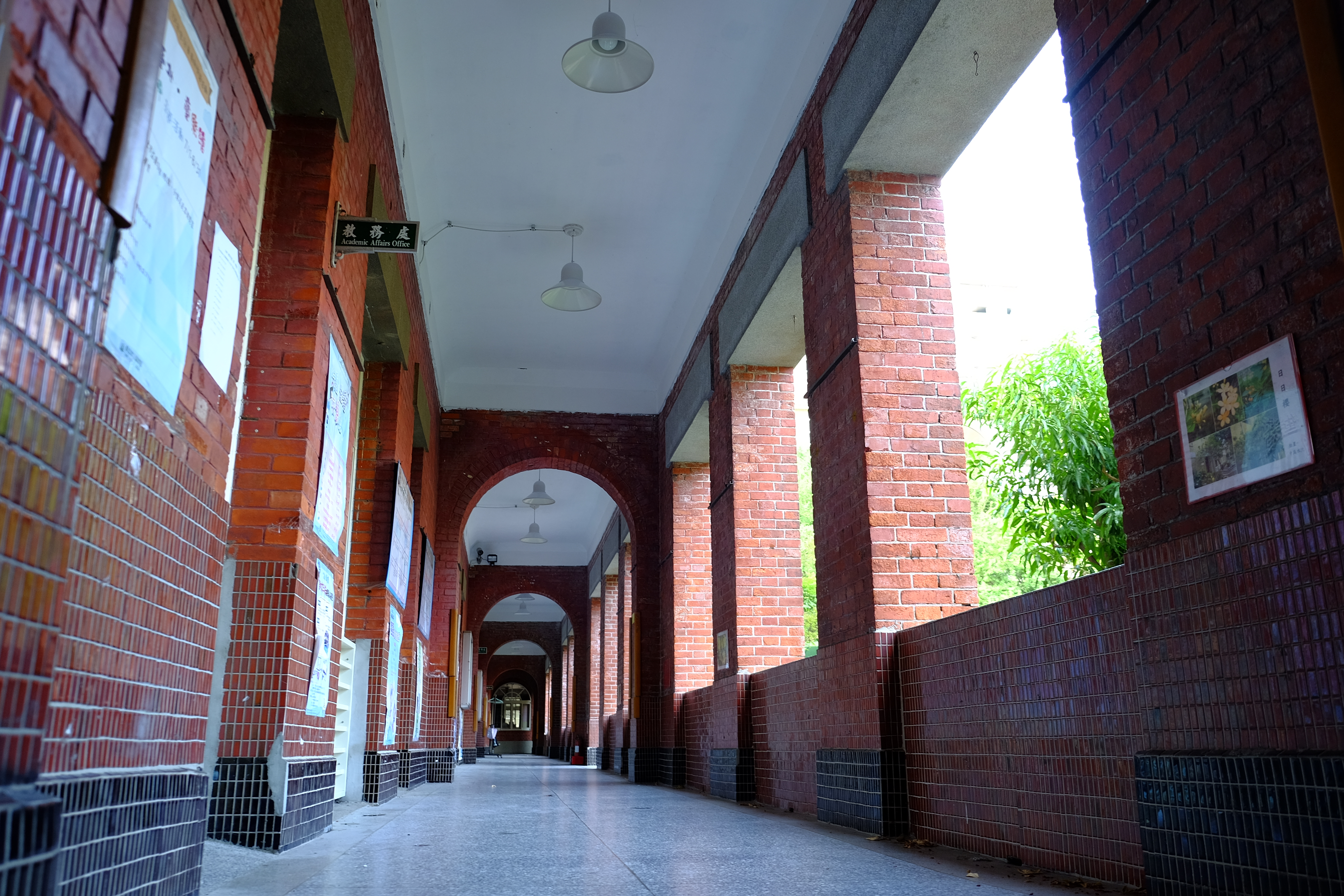 臺北市大同區日新國民小學 Taipei Municipal Rixin Elementary School